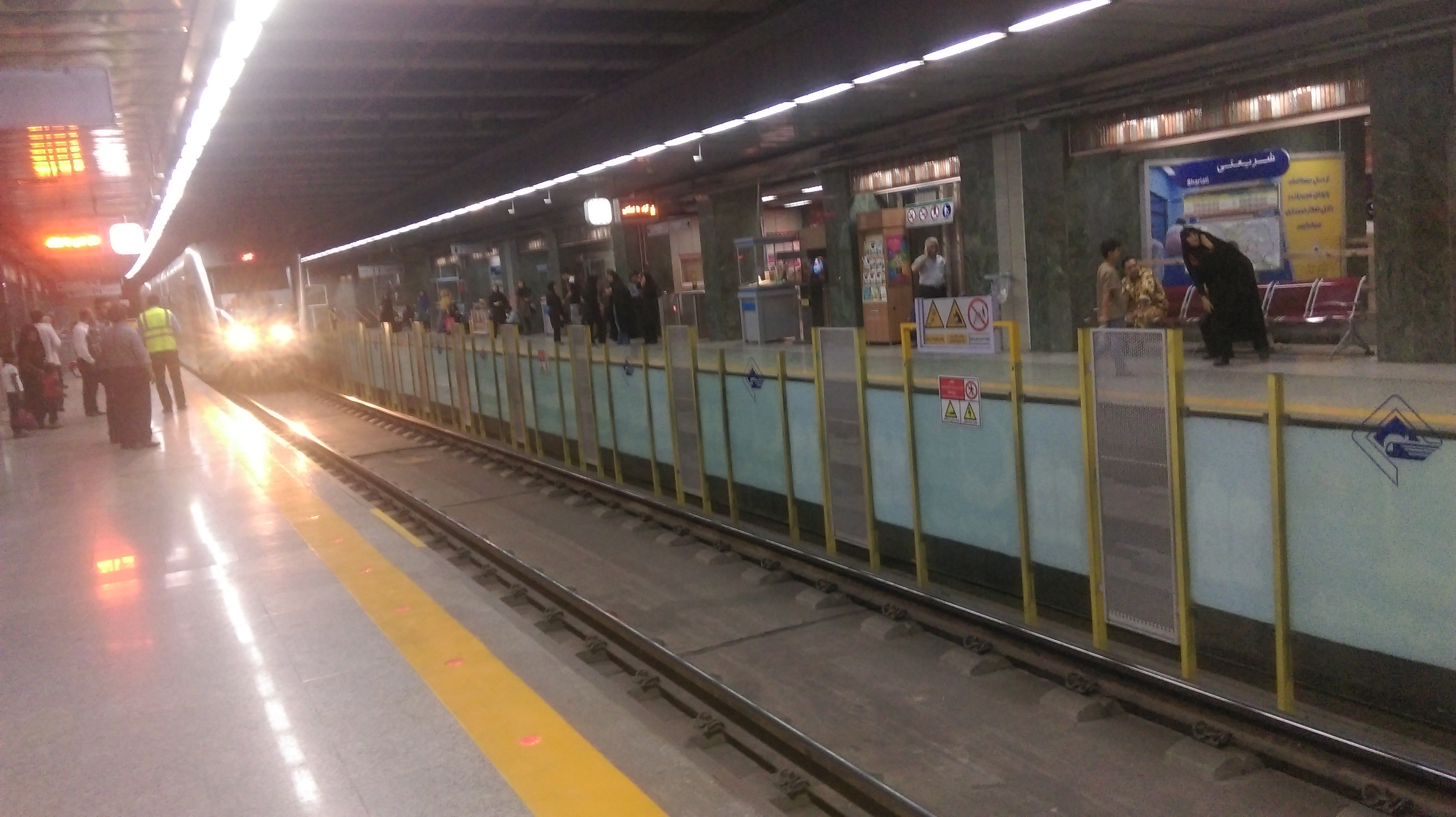 ایستگاه مترو شریعتی مترو مشهد